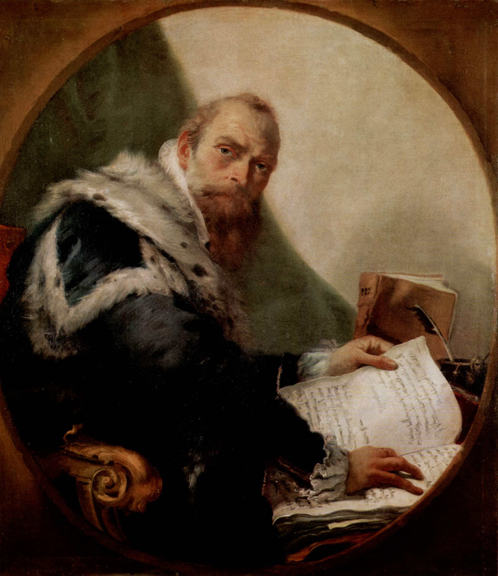 Fragment